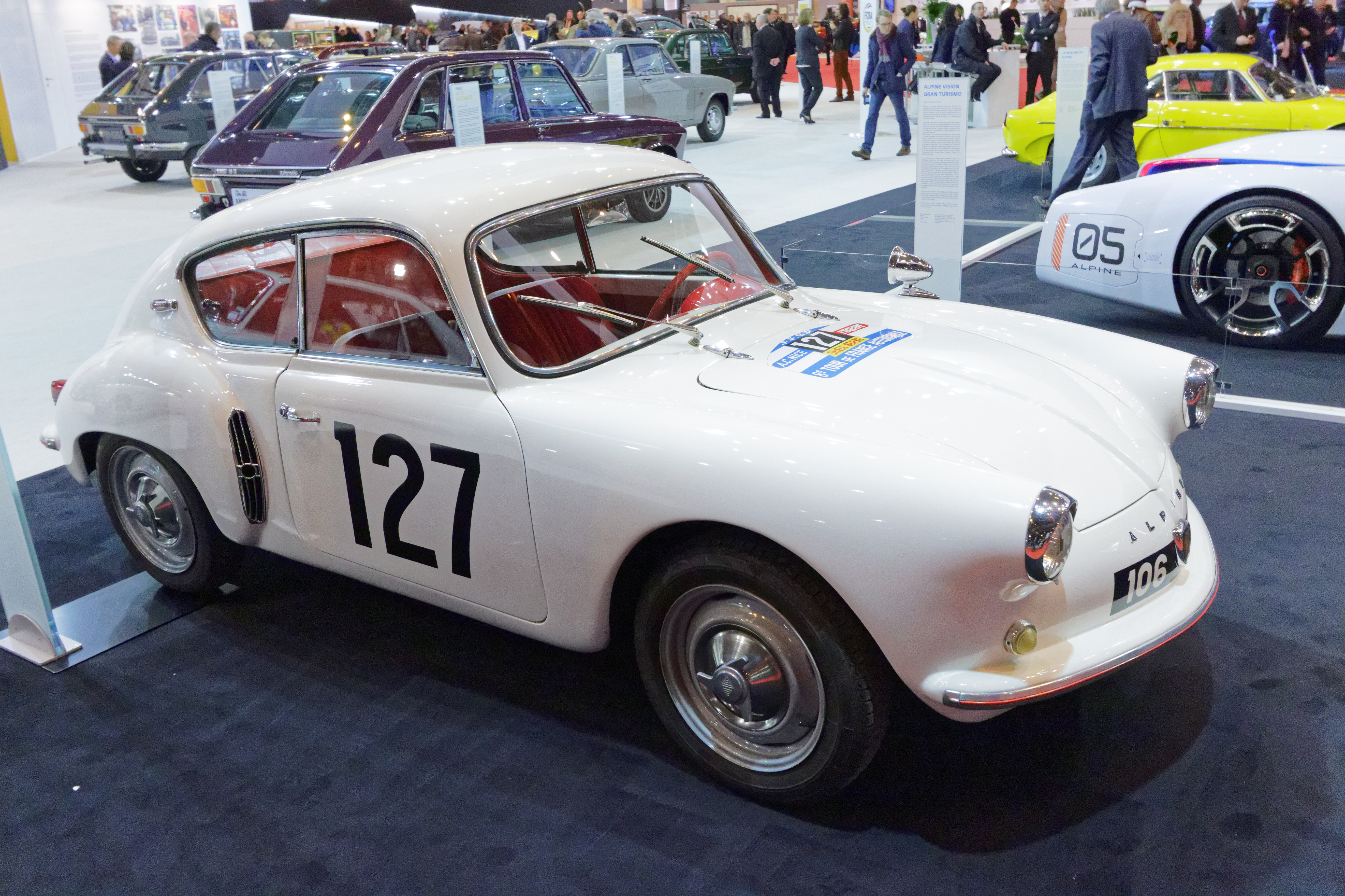 Une des voiture présentée lors du salon Rétromobile de Paris 2015